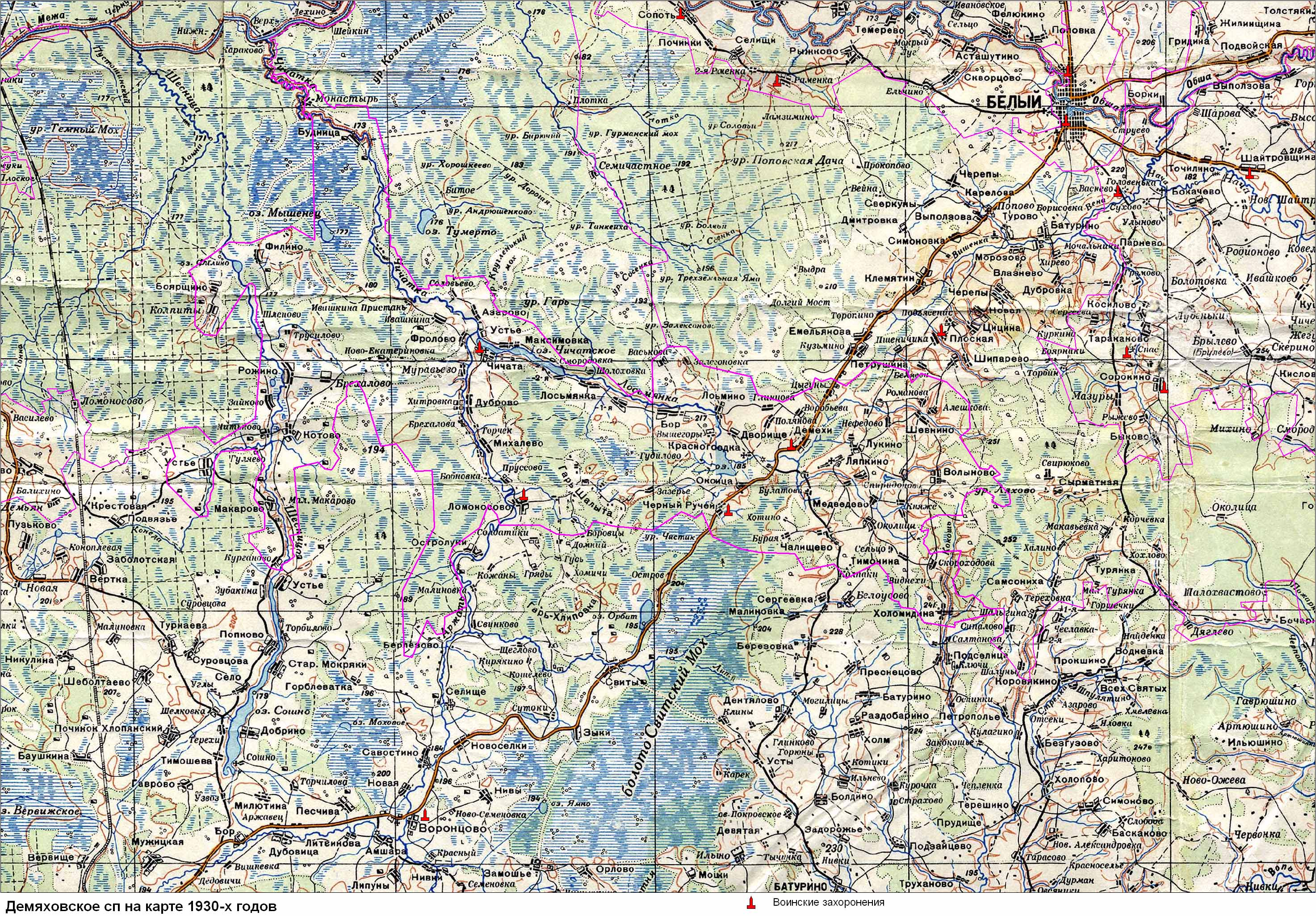 Территория Демяховского сп на карте 1930-х годов.